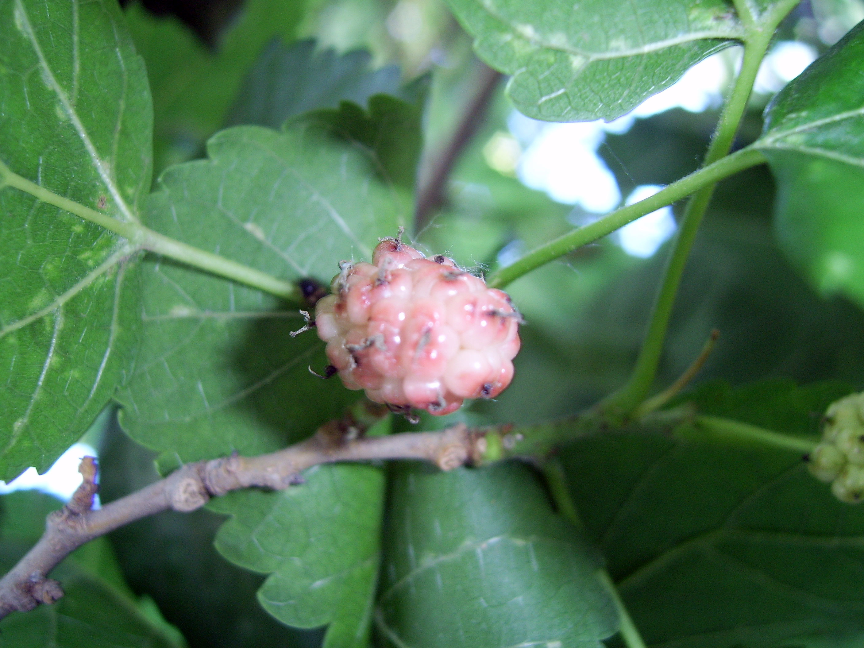 桑椹，北京植物园